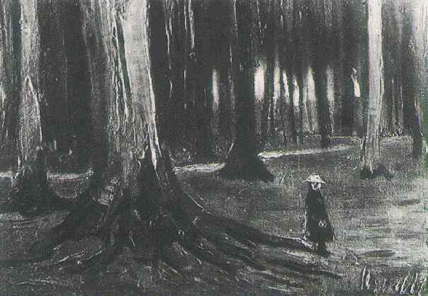 Pintura estancia en La Haya